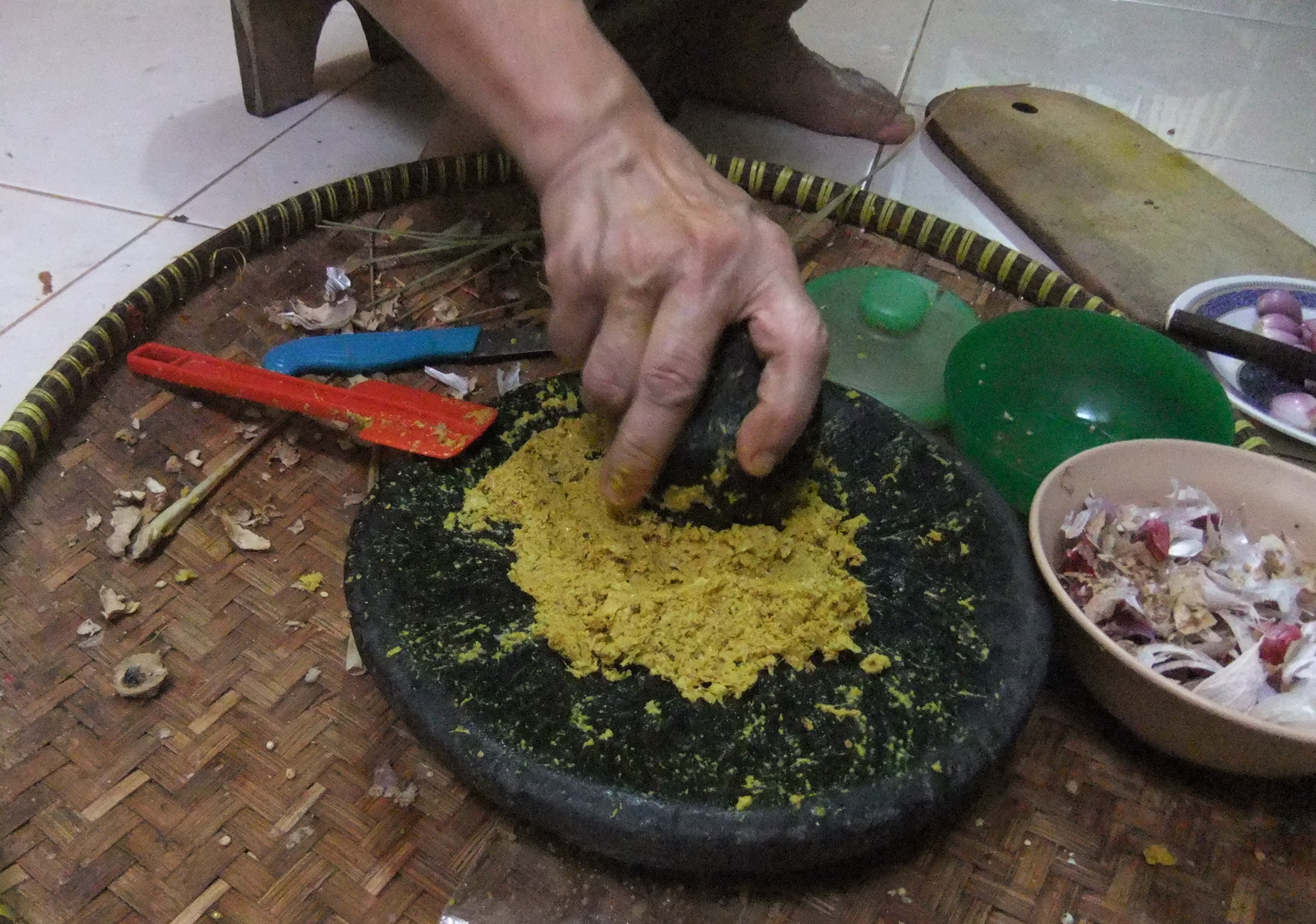 Mengulek bumbu (kunyit)